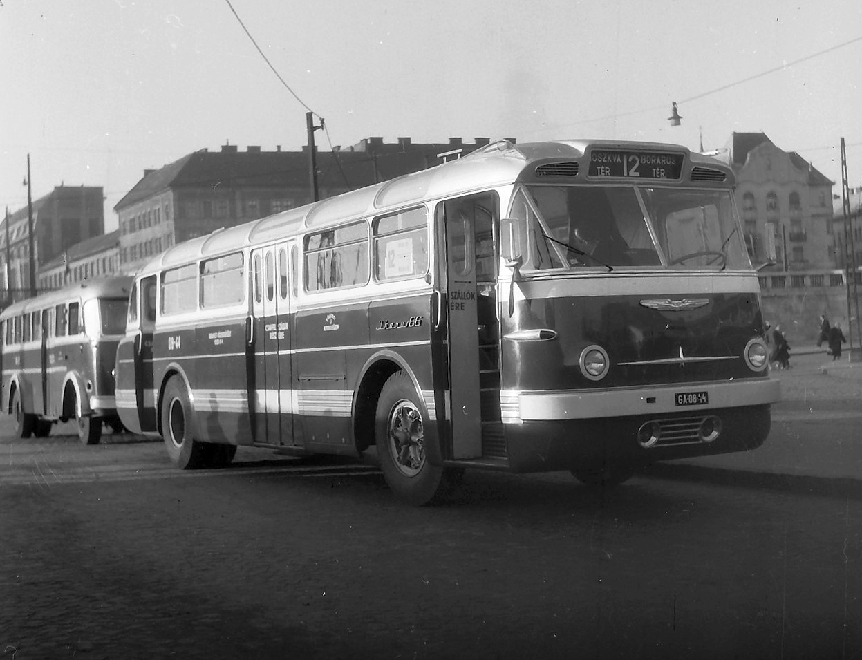 Boráros tér. Location: Hungary, Budapest IX. Tags: bus, Ikarus-brand, Hungarian brand, number plate, Budapest Title: Boráros tér.